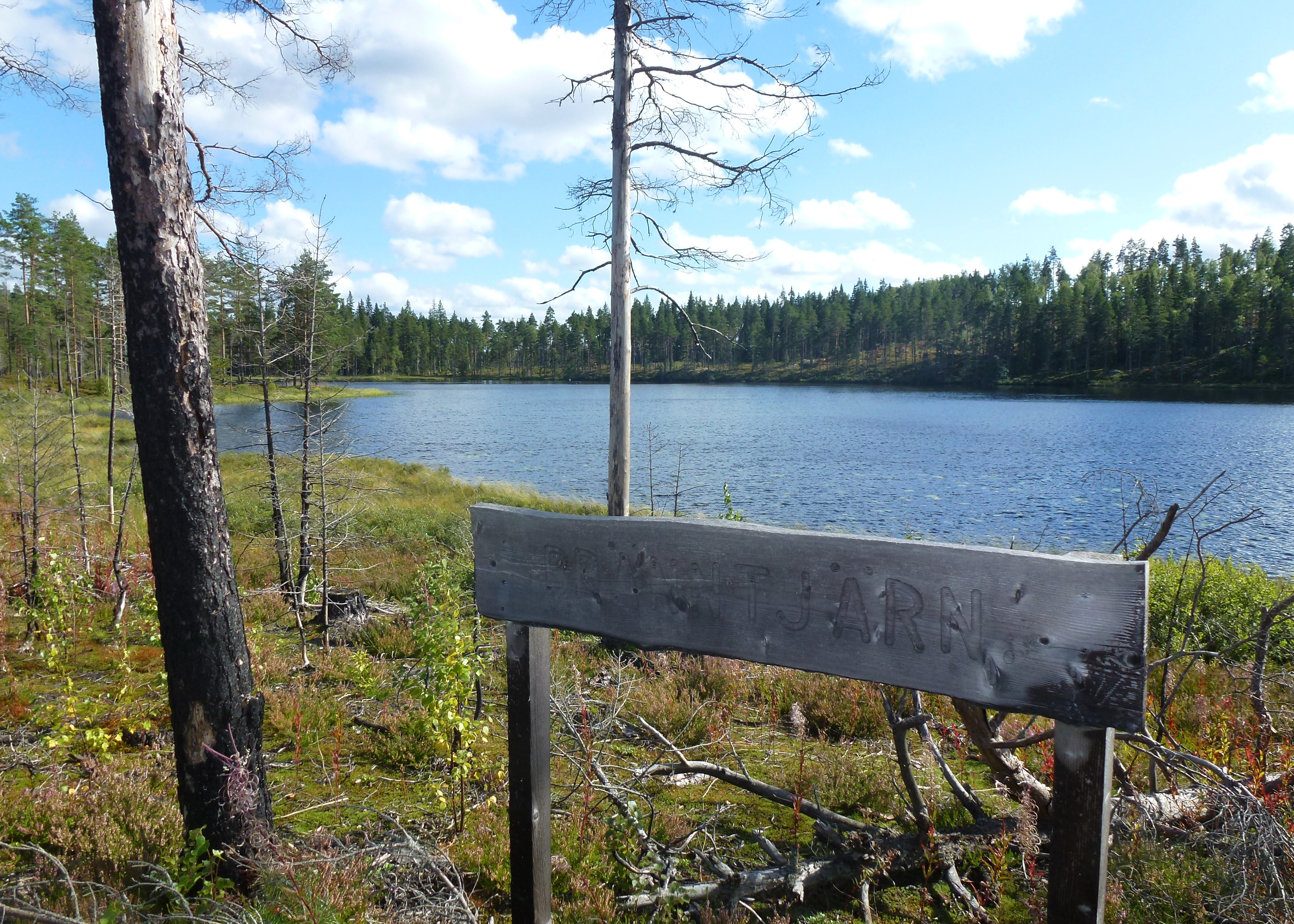 Bränntjärnen (Grangärde socken, Dalarna)